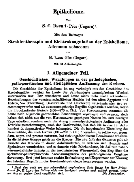 A Beck Soma által írt Epitheliome c. fejezet első oldala a Handbuch der Haut - und Geschlechtskrankheiten című könyvben